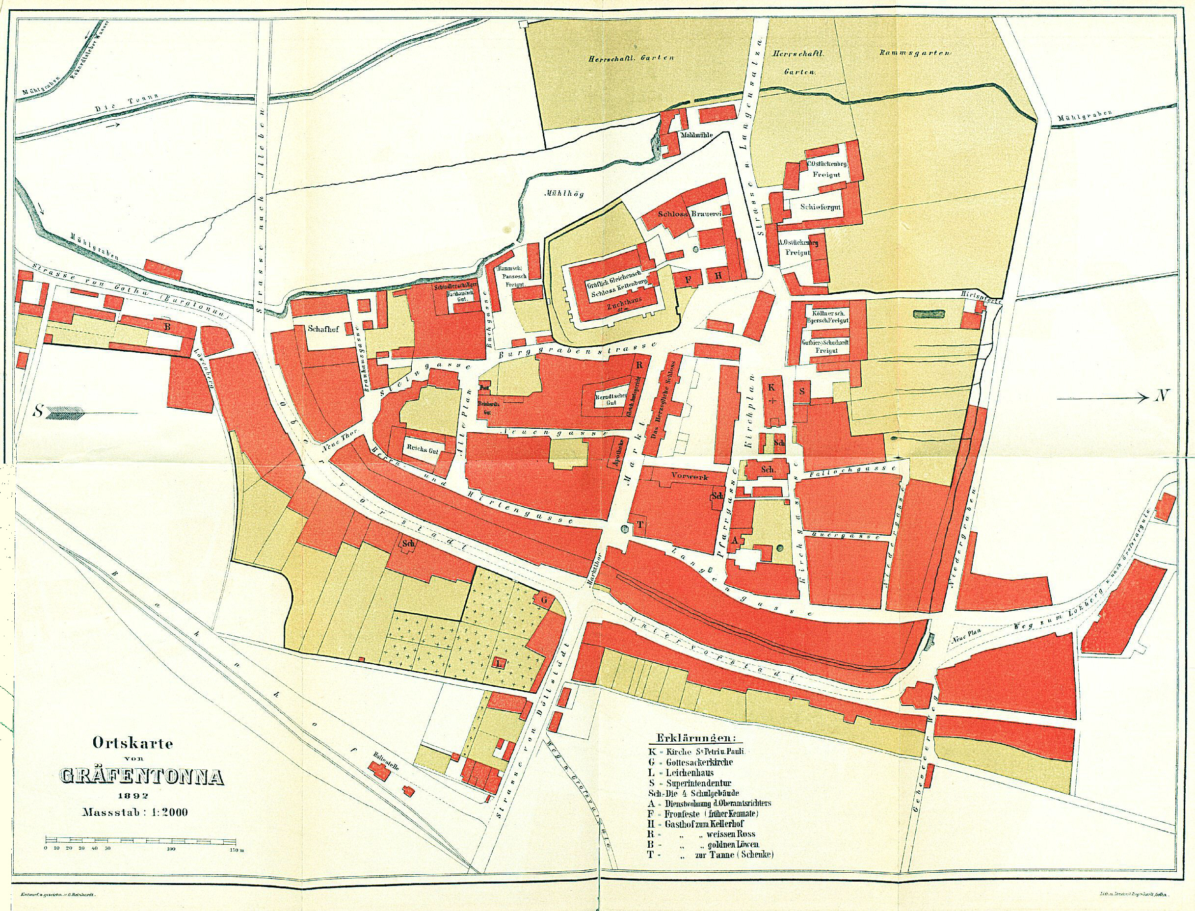 Kartenbeilage zur Ortschronik.